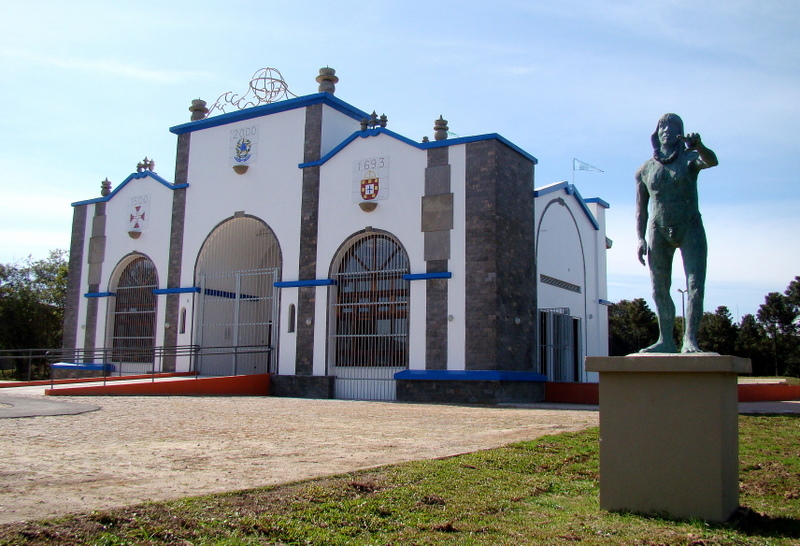 Centro Cultural Vilinha, em Curitiba (capital do estado do Paraná, Sul do Brasil), localizado às margens do Rio Atuba (no Bairro Alto) dentro do Parque Histórico de Curitiba/Parque Histórico da Vilinha.